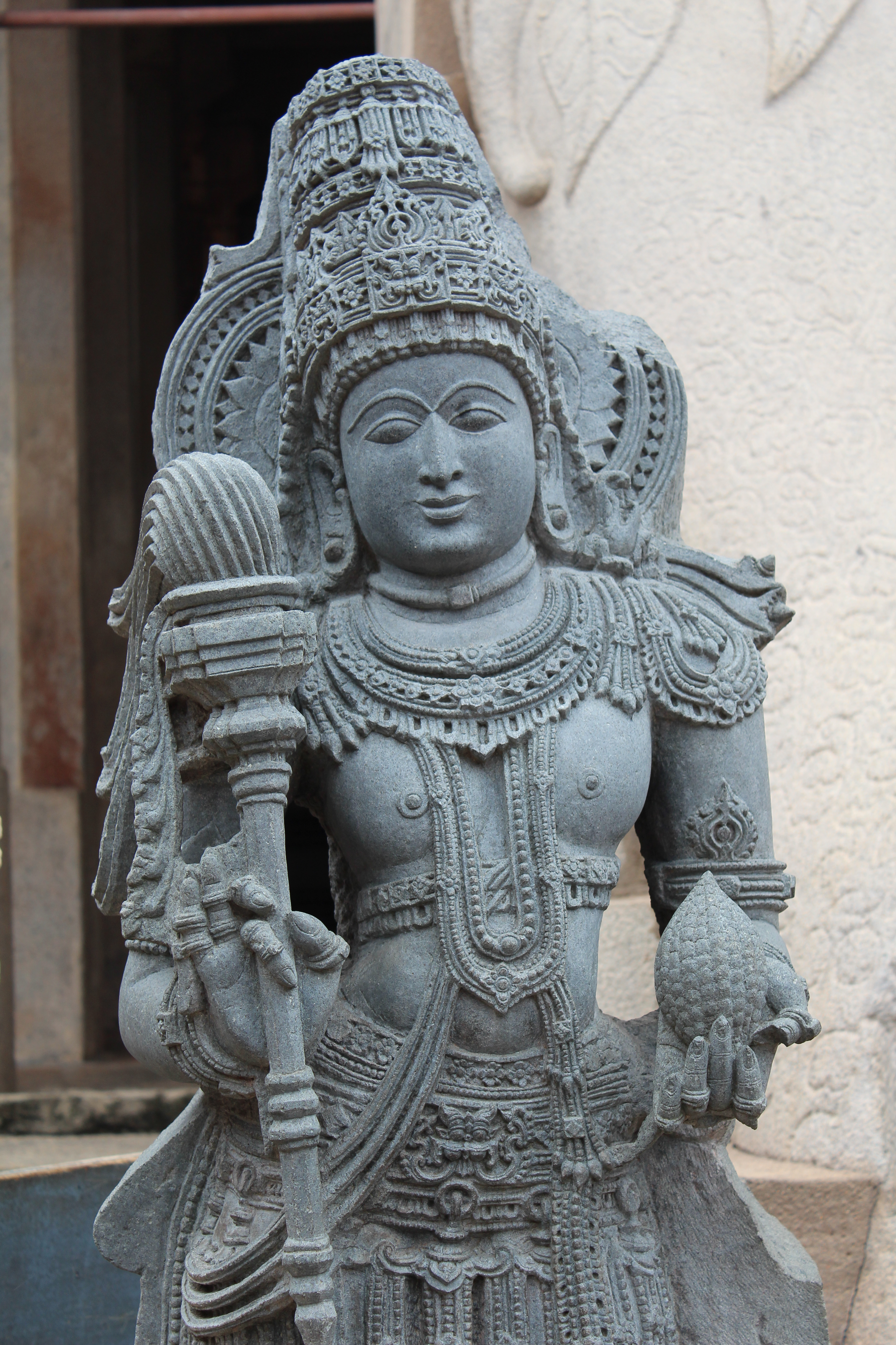 Statue of Jwalamalini at Shravanabelagola